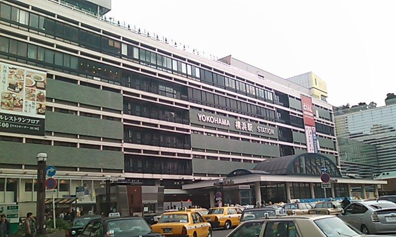 横浜駅 西口方駅舎